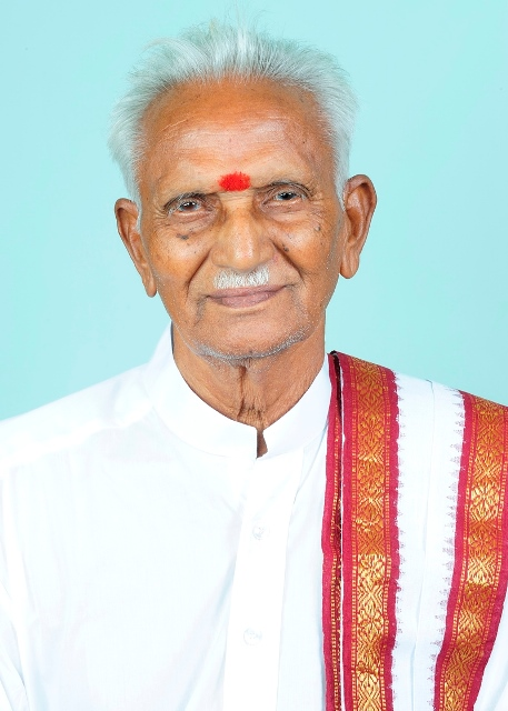 శ్రీ గంగా అన్నపూర్ణ సమేత శ్రీ కాశీవిశ్వేశ్వరస్వామి దేవస్థానంలో కళ్యాణమండపం కట్టించారు.